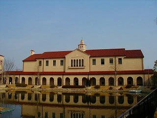 関西学院大学法科大学院棟（西宮上ヶ原キャンパス）